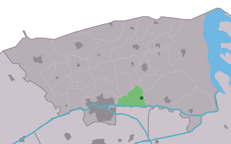 Kaartsje fan himrik fan Eastrum